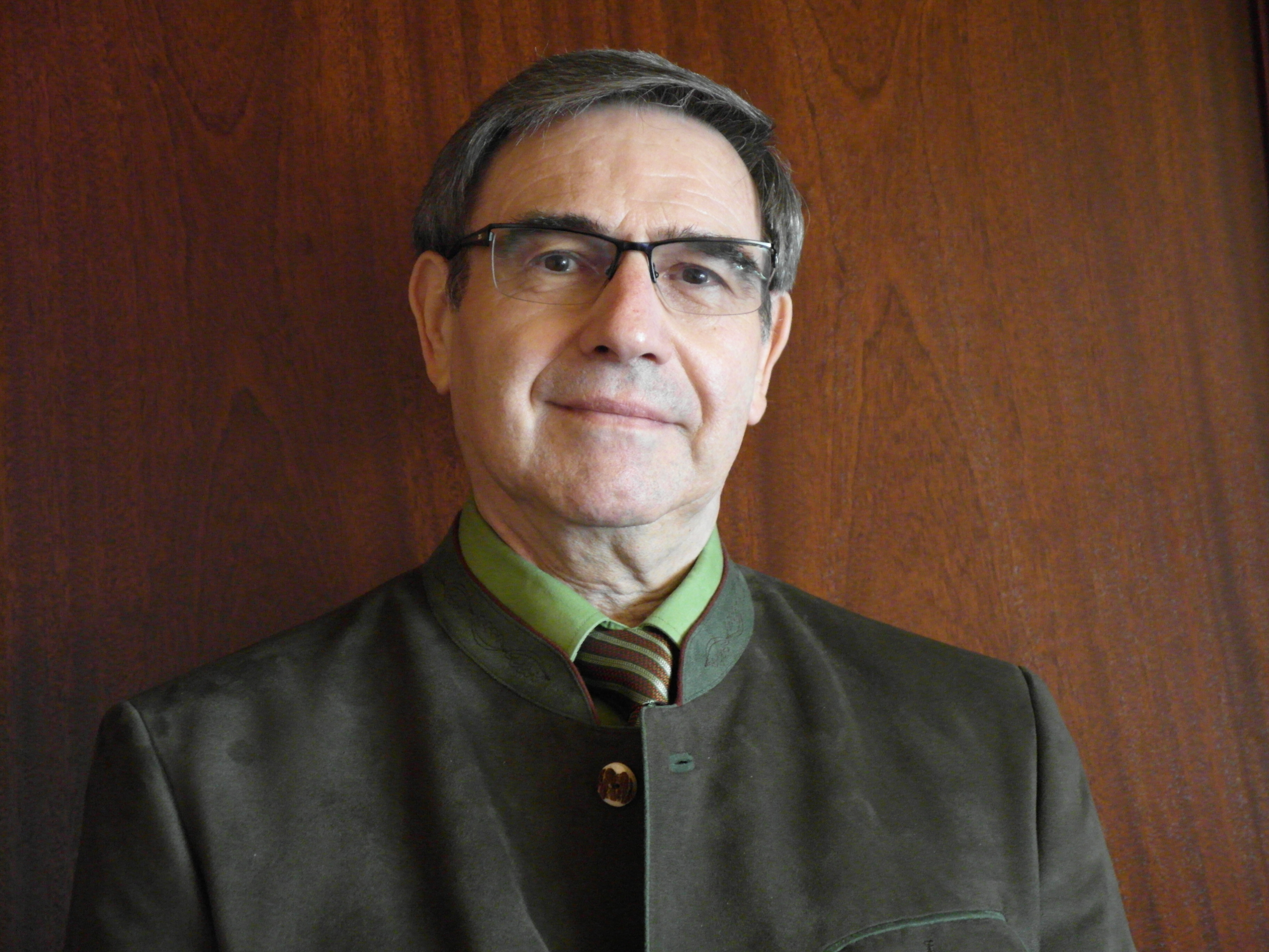 Hans-Joachim Müller, Ottweiler, Deutschland